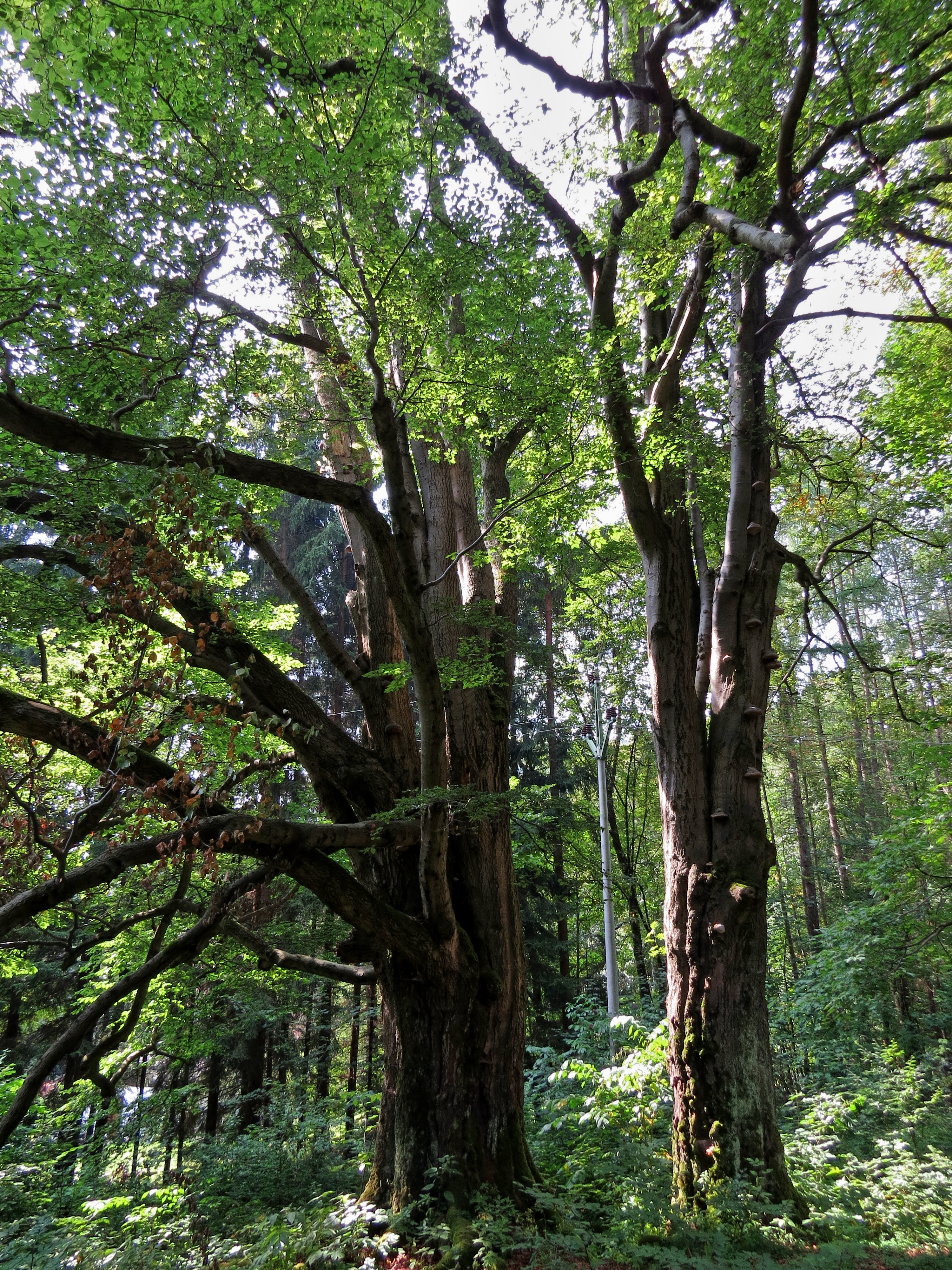 Památné buky u lesní cesty pod hájenkou v Janovicích, blízko st. silnice v tzv. Janovických peřejích